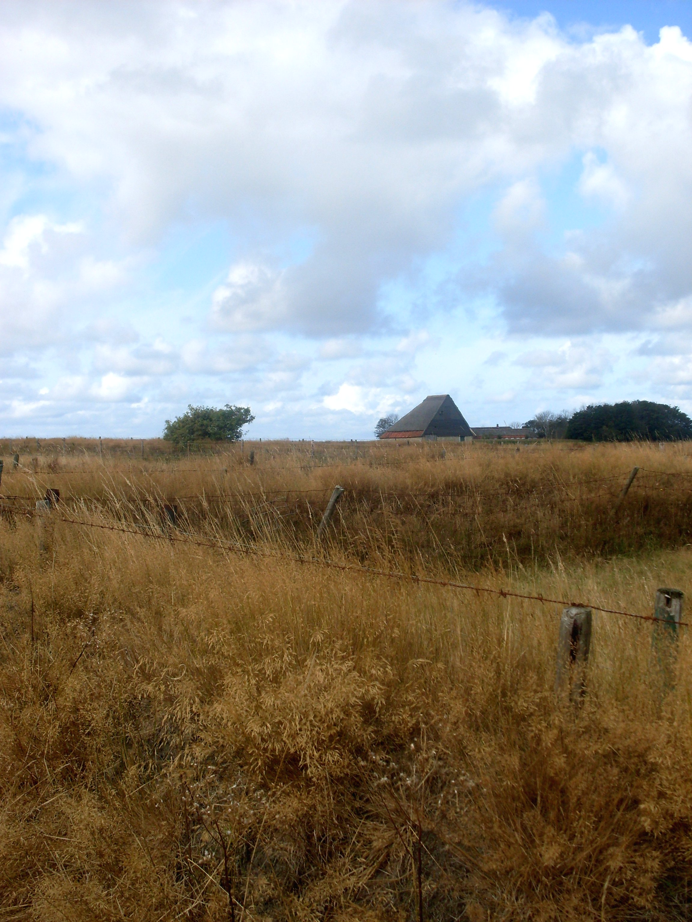 Tuunwallen op het eiland Texel